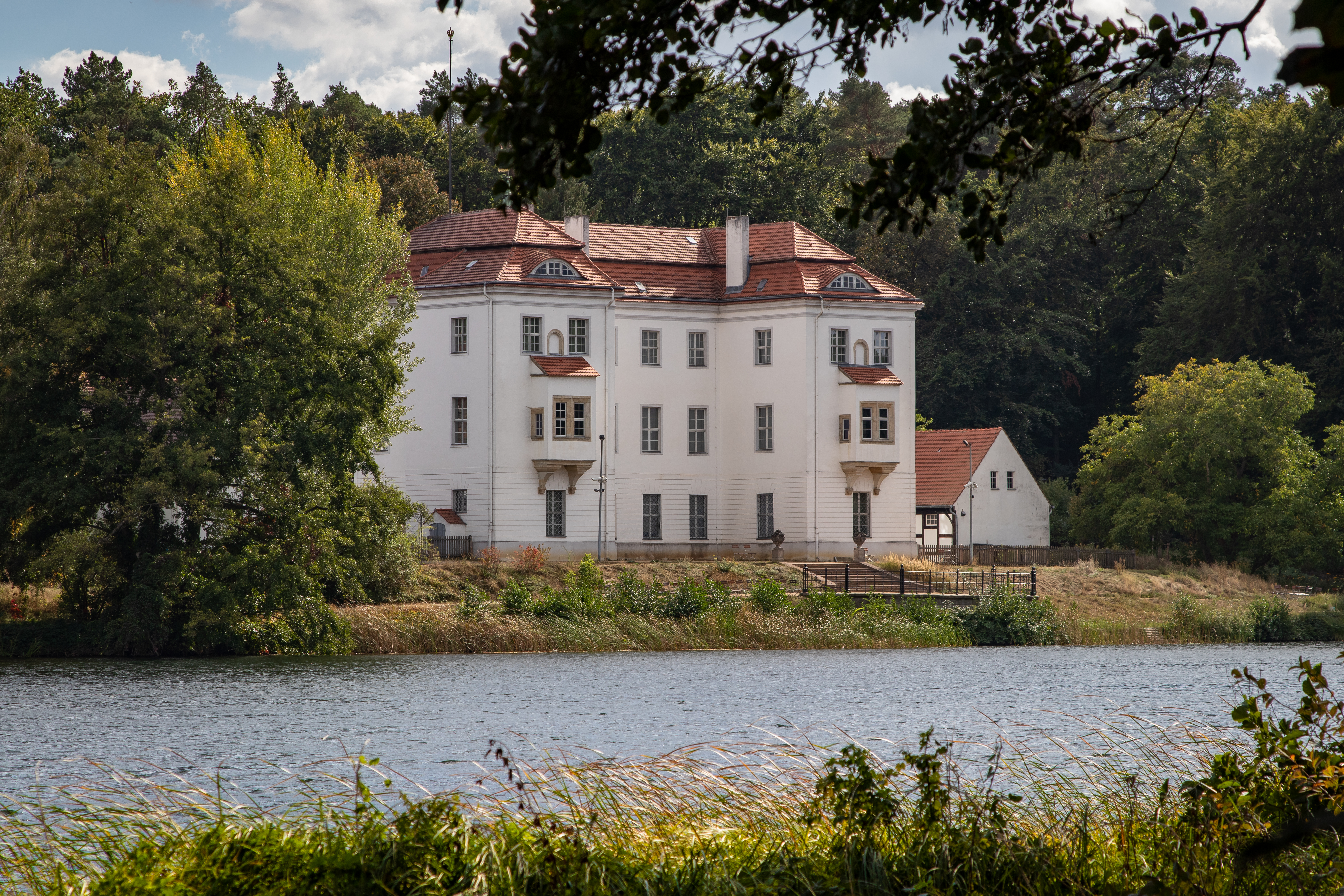 Jagdschloss Grunewald, Denkmal Berlin 09075448